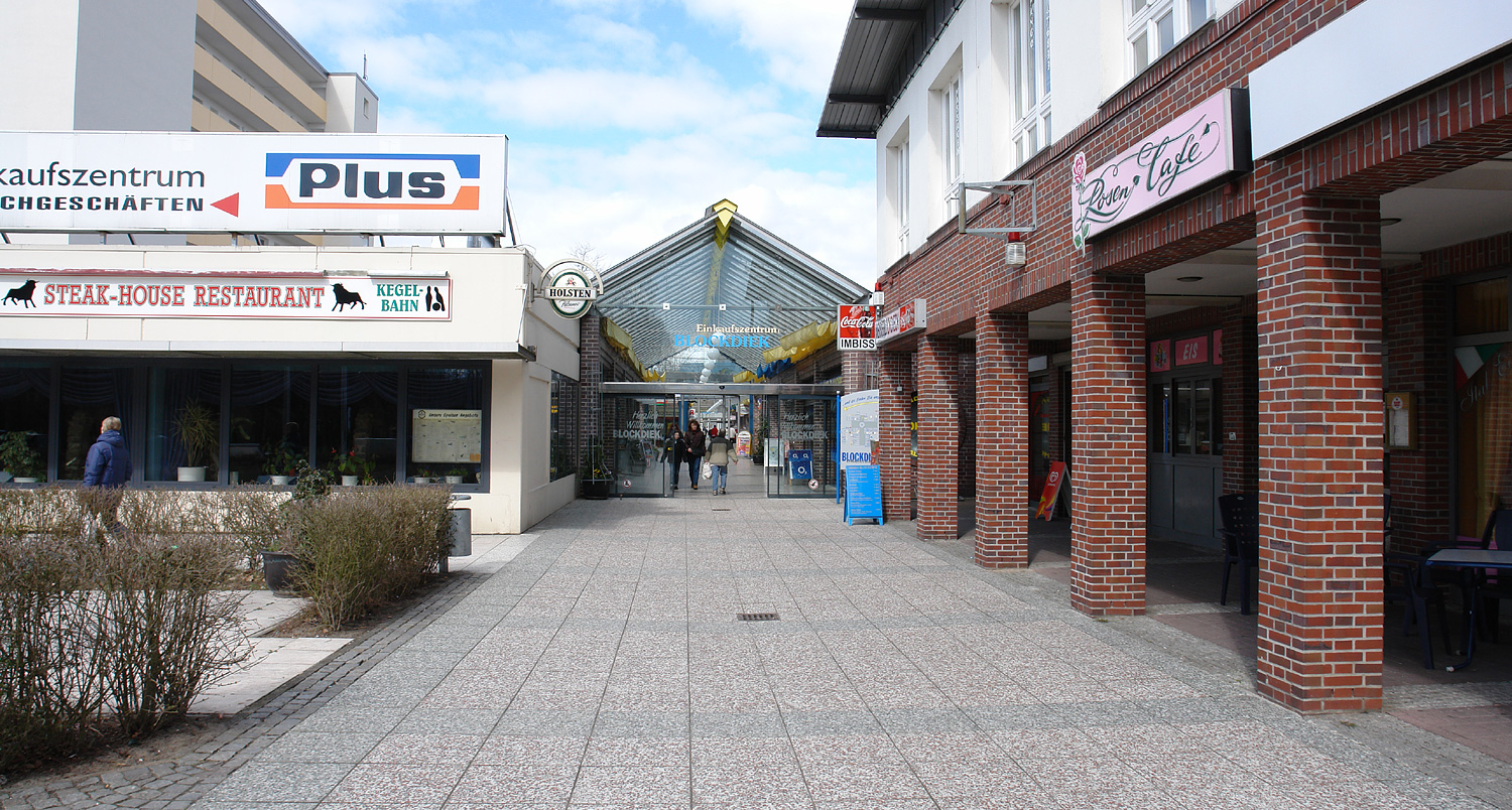 Einkaufszentrum Bremen-Blockdiek. Eingang Roseliusallee